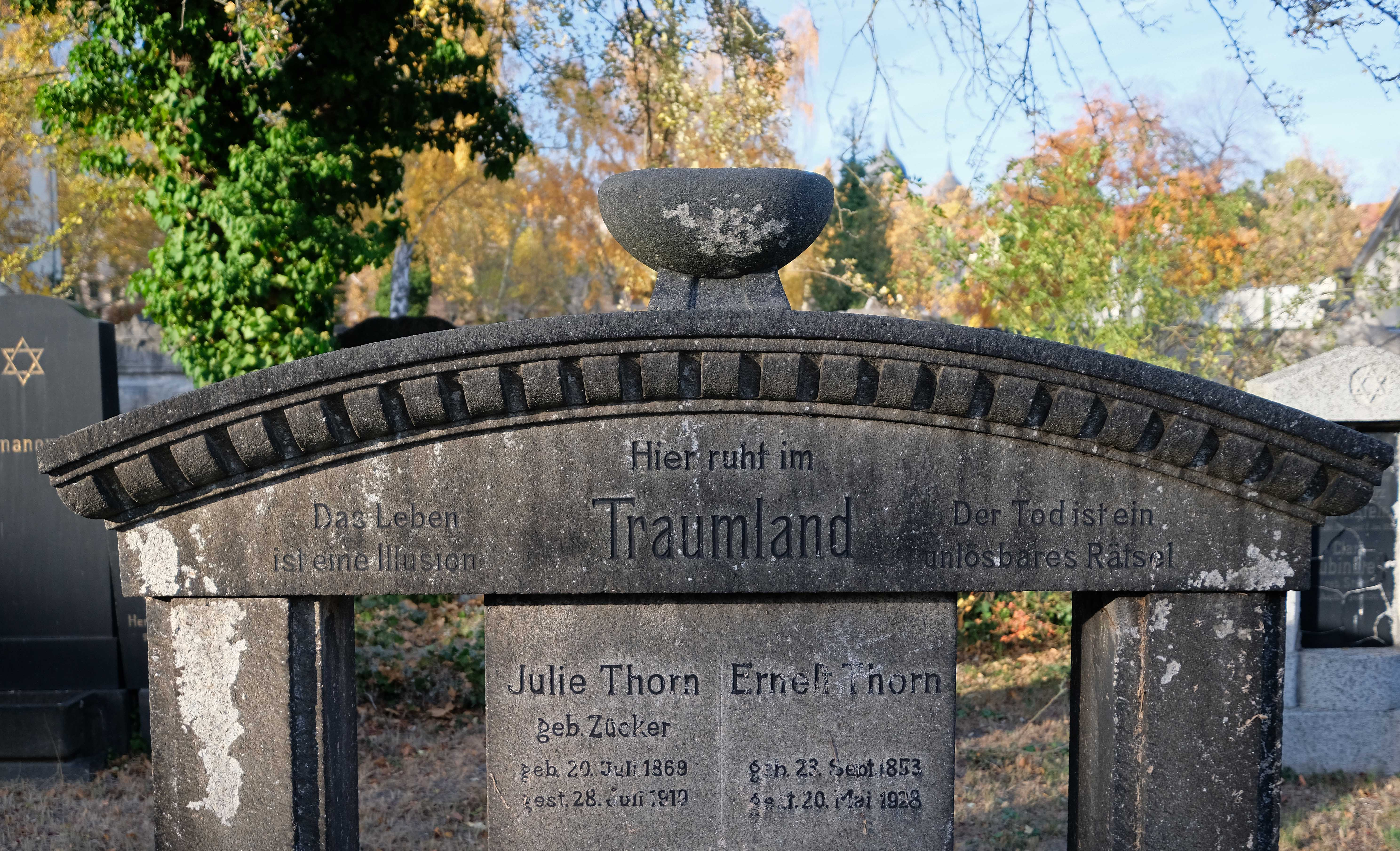 Ausschnitt Grabstein des Magiers Ernest Thorn und seiner Frau und Assistentin Julie Thorn auf dem alten israelitischen Friedhof in Leipzig.